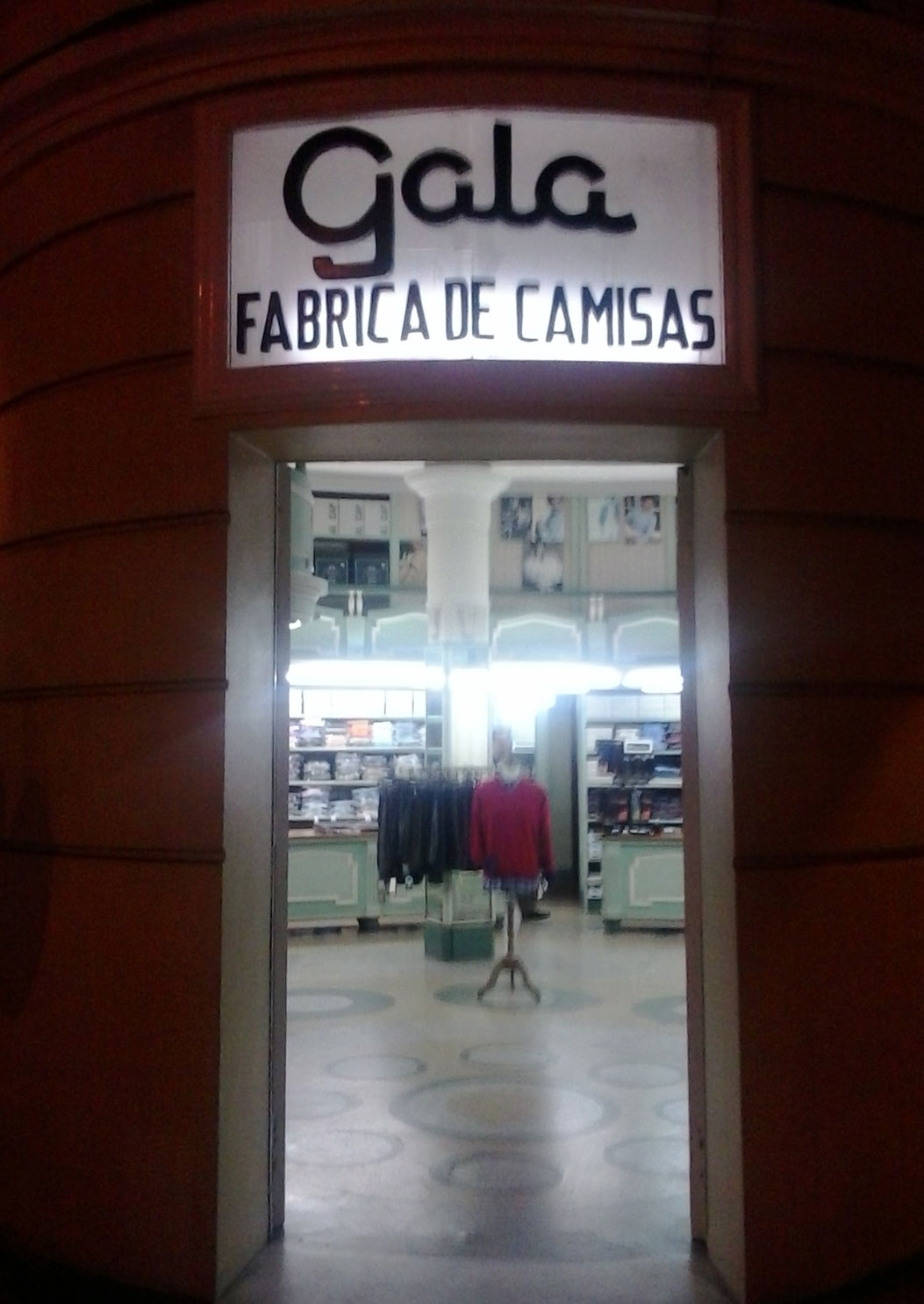 Porta de Gala, fábrica de camisas A Coruña Galiza